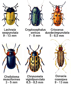 Chrysomelidae spec.